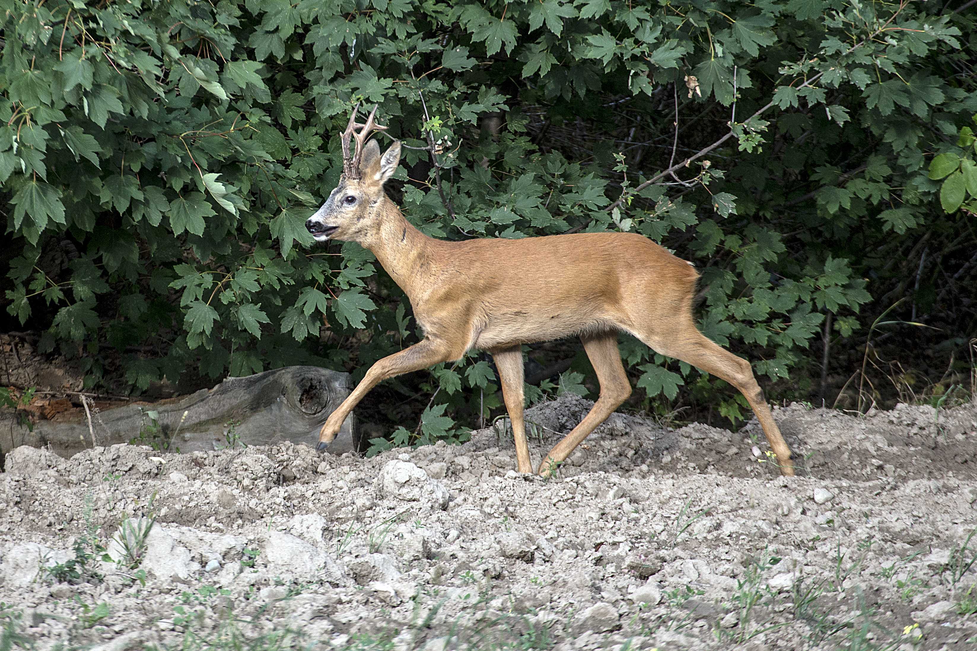 Lodz, Poland